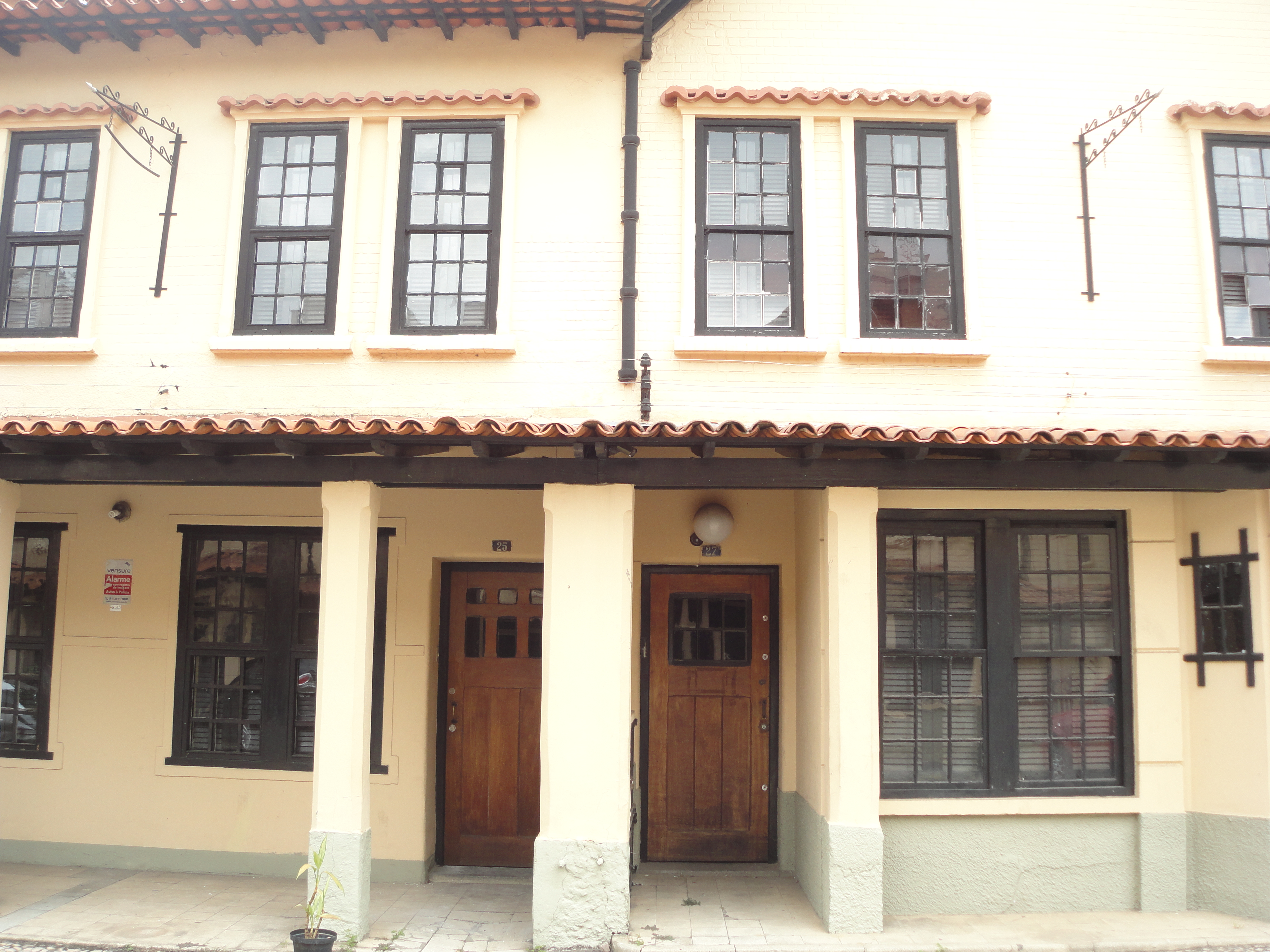 Detalhes de casas da Vila dos Ingleses, em São Paulo (SP), Brasil.